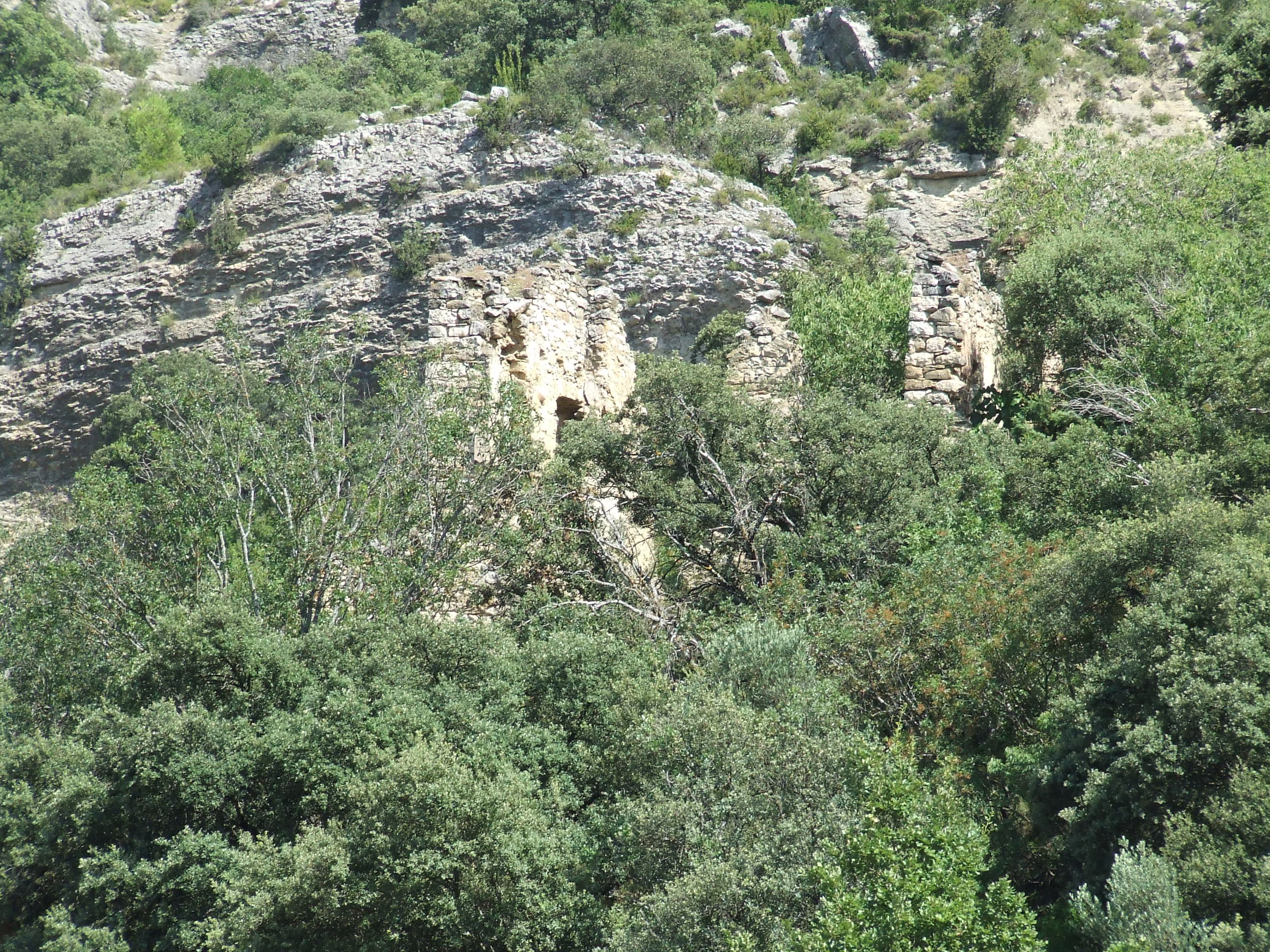 Ruïnes de les Esplugues (Mur, Castell de Mur, Pallars Jussà)